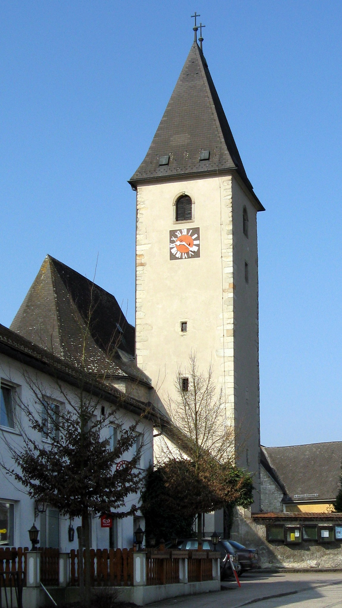 Kirchturm der Pfarrkirche Pergkirchen in der Stadtgemeinde Perg